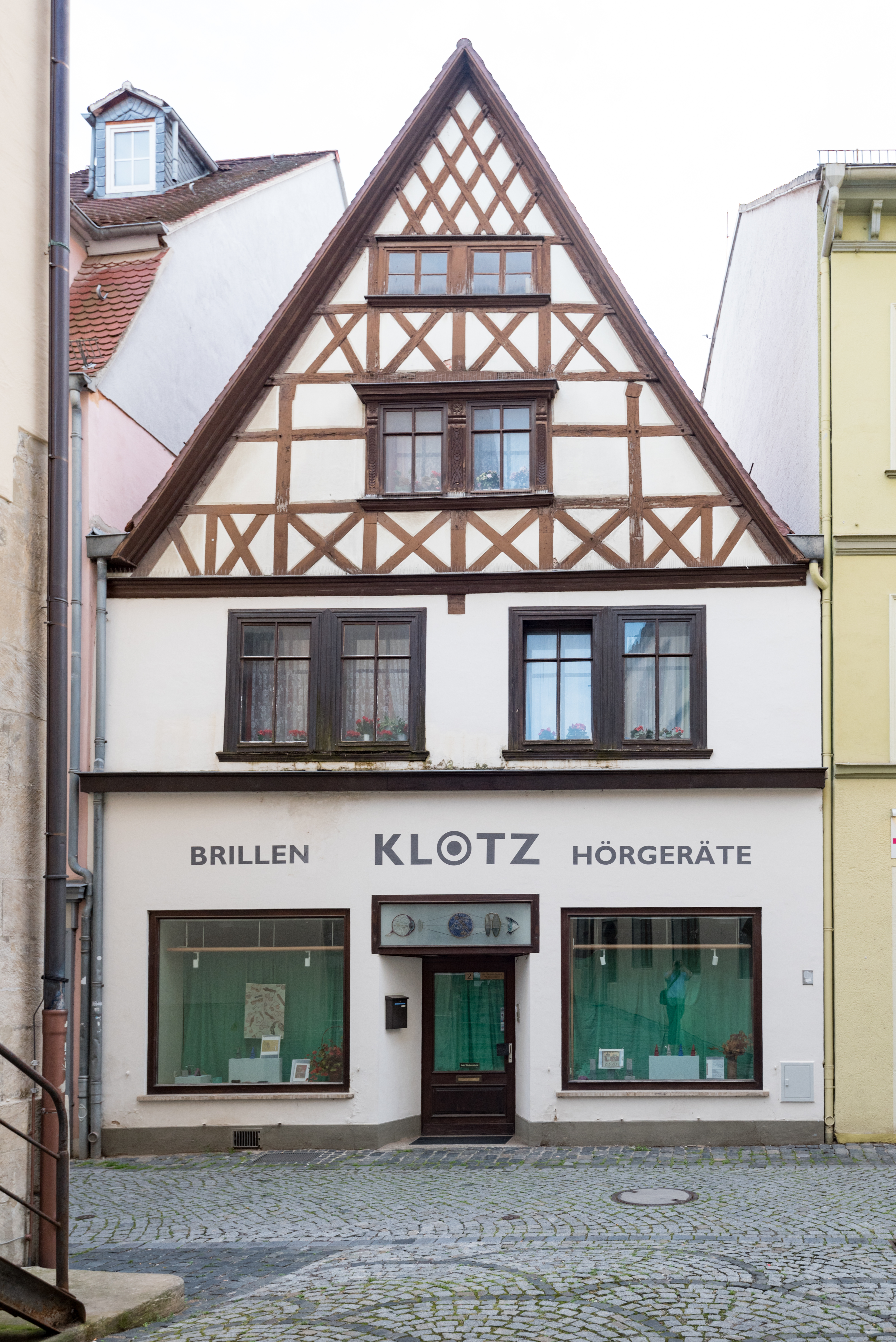 Naumburg (Saale), Engelgasse 2